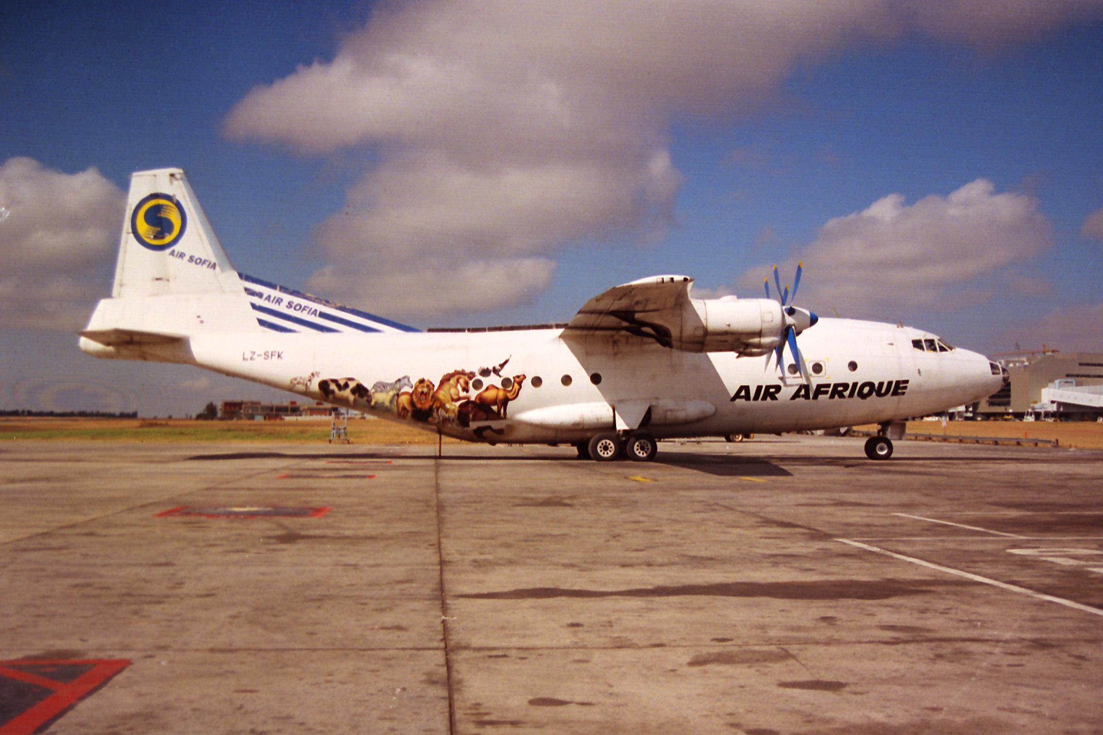 Air Afrique (Air Sofia) AN12 LZ-SFK